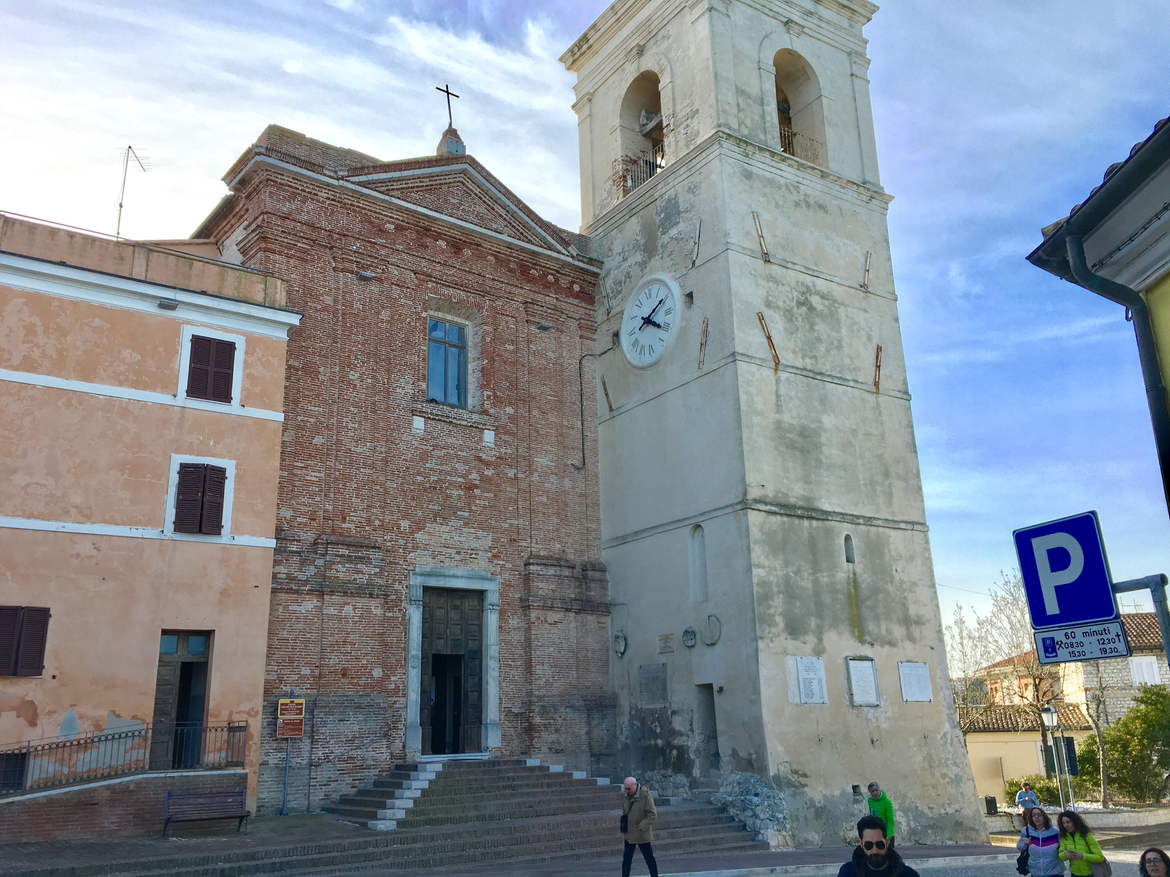 Chiesa principale di Sirolo